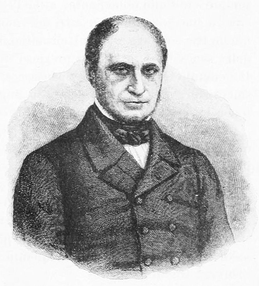 Gustavo Ponza di San Martino